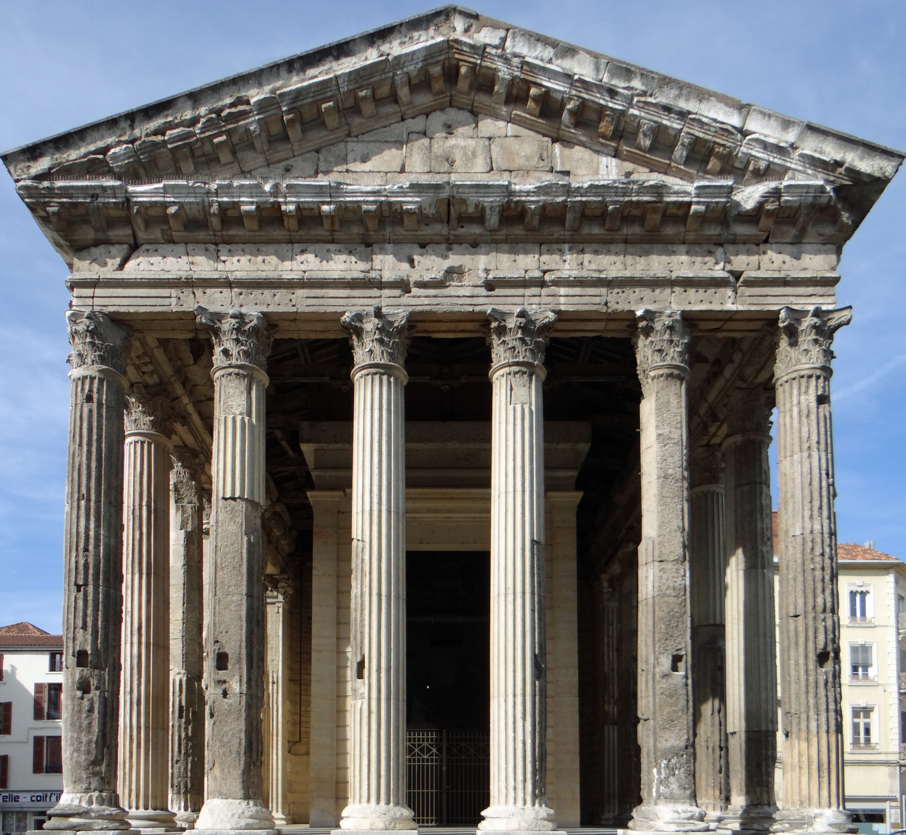 Vienne - Temple d'Auguste et de Julie (sept. 2013)